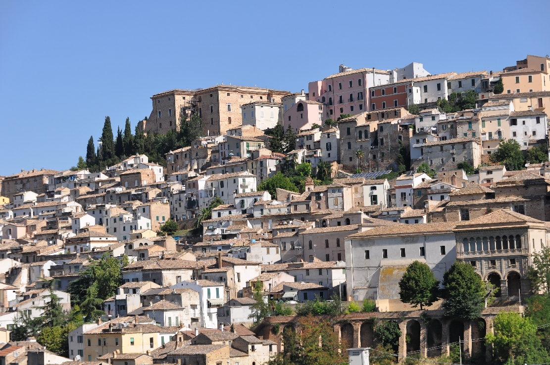 Loreto Aprutino 2012